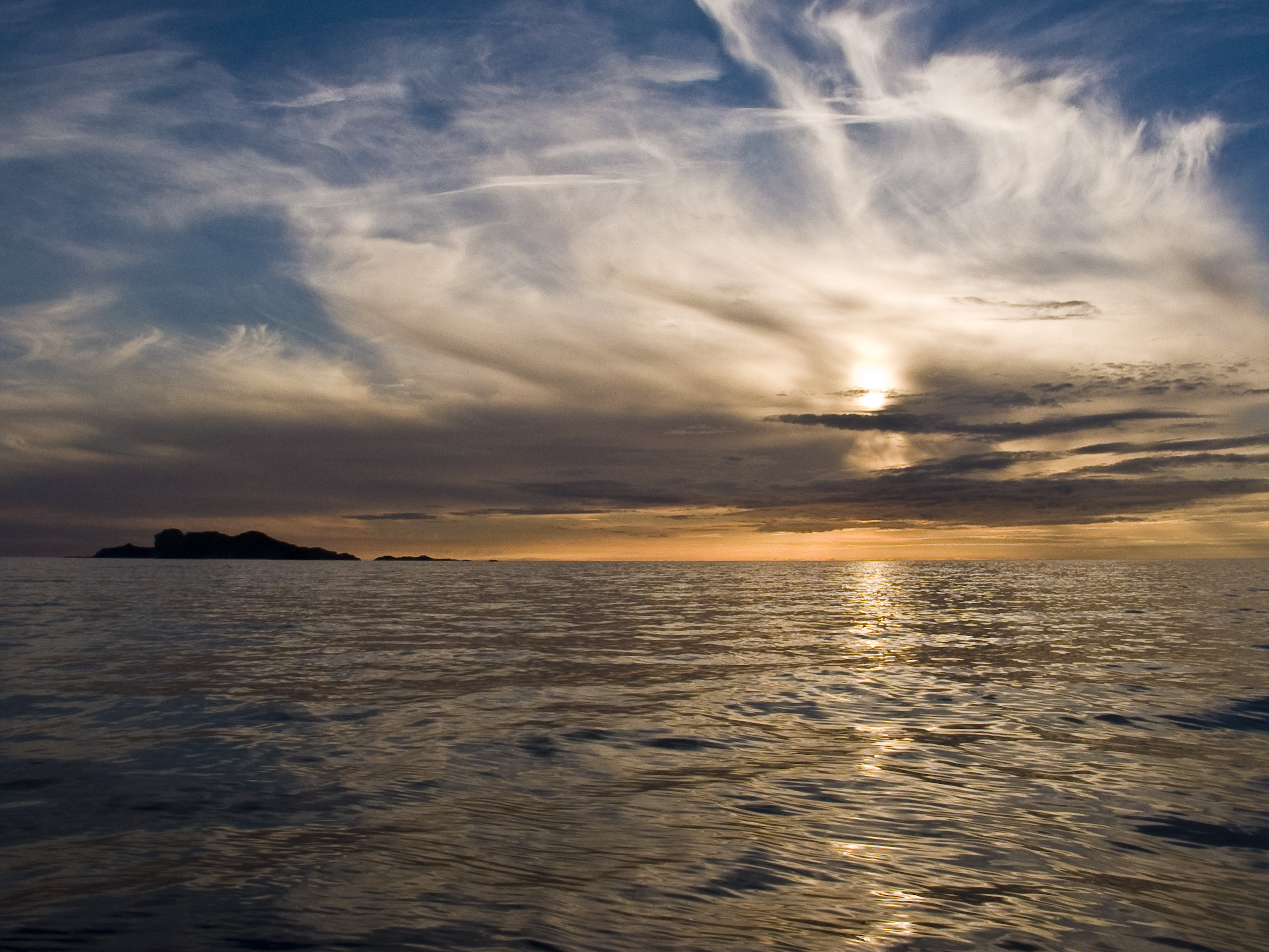 I innlaupet til fjorden Nordfjord. Øya er Klovningen. Sunset outside of Husevåg. The islet to the left is Klovningen.